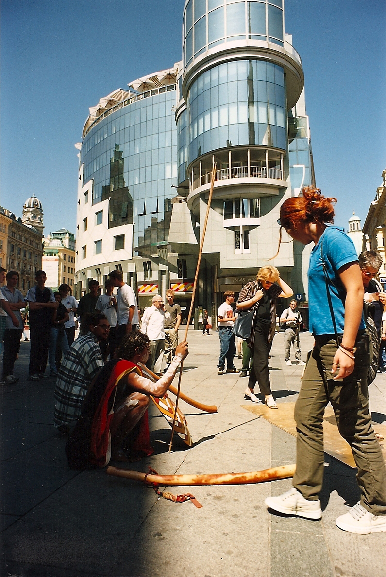 19. Juni 2000. Eine Social Gold Performance am Wiener Stephansplatz mit dem Australischen Aborigine Künstler Warren Clemens Wunba. Idee, Organisation, Reallisation Johannes Angerbauer-Goldhoff